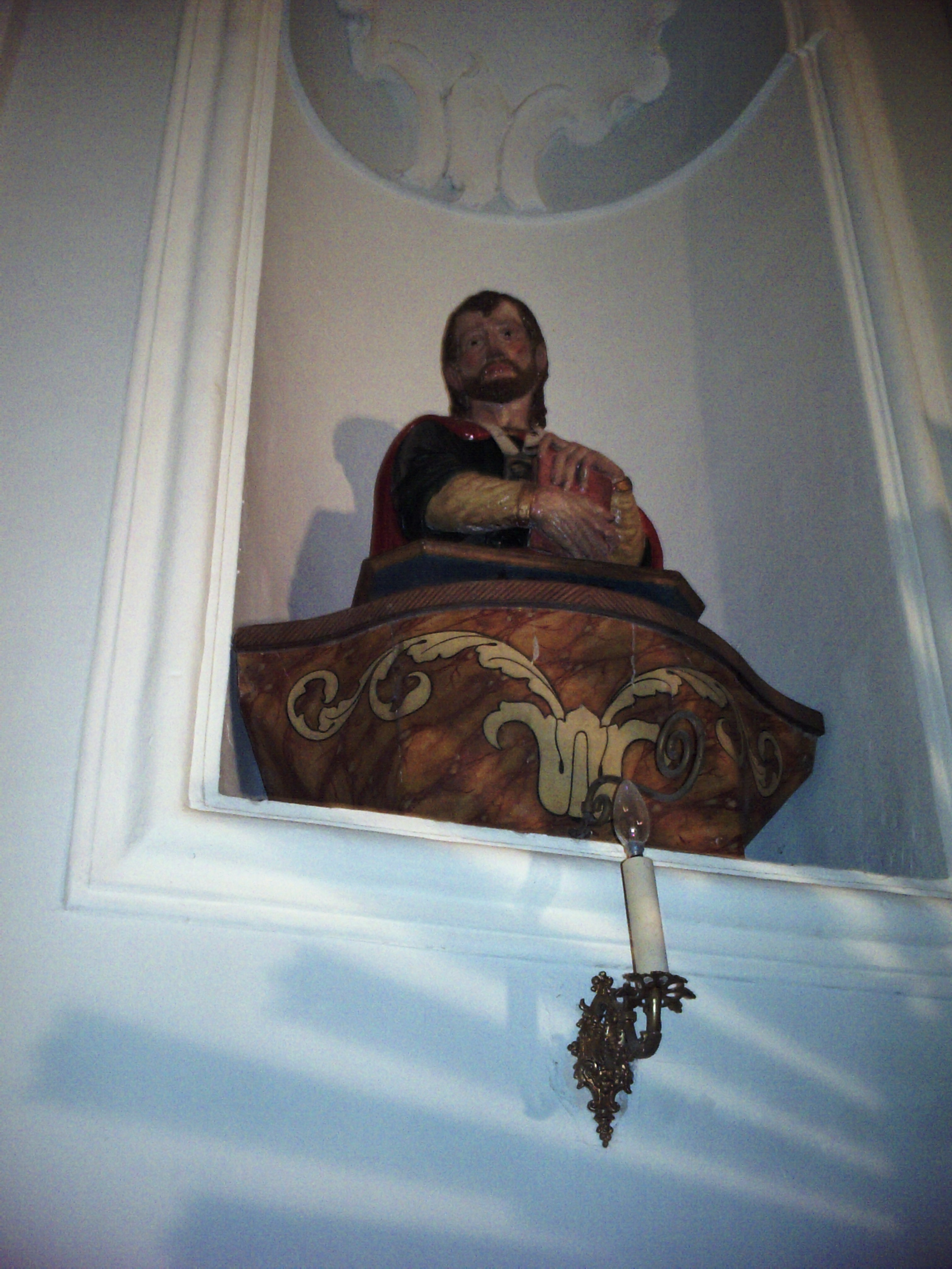 Scultura di soggetto religioso conservata nella chiesa della Madonna della Libera in Cerreto Sannita (Bn).